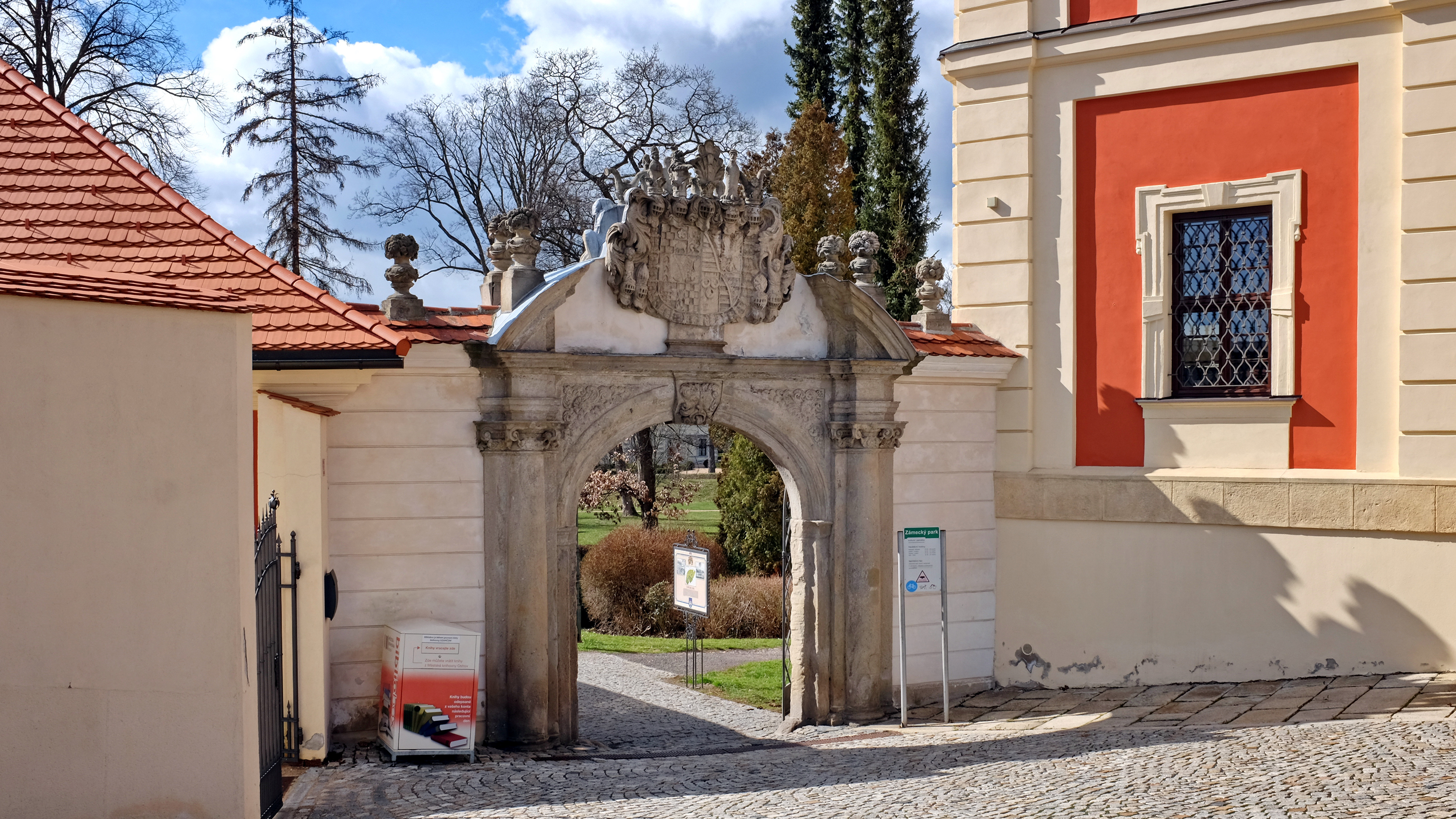 Zámek Ostrov, Jáchymovská 1, Ostrov (okres Karlovy Vary).